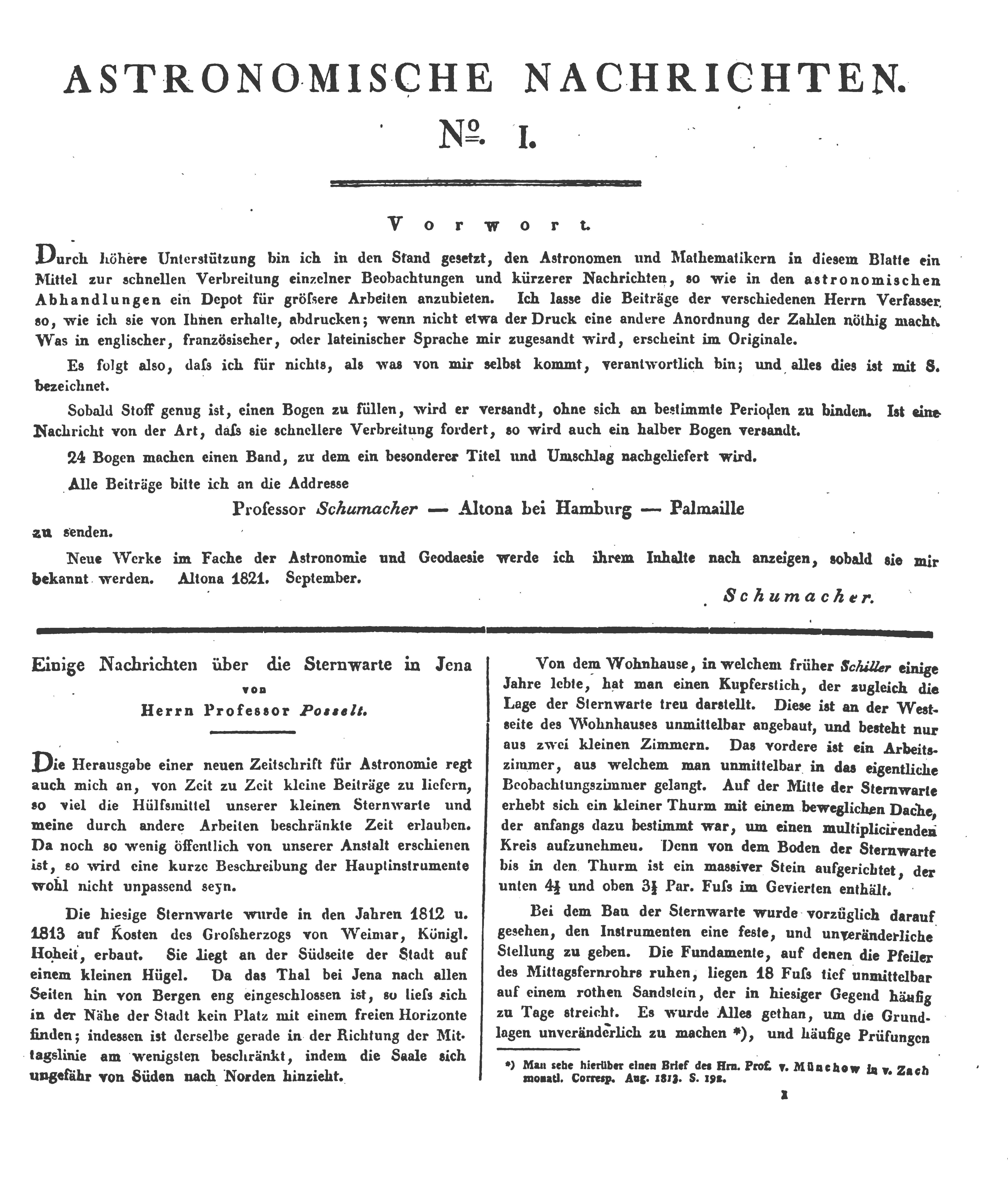 Astronomische Nachrichten, Nr. 1, September 1821, Titelblatt, Spalte 1–2.